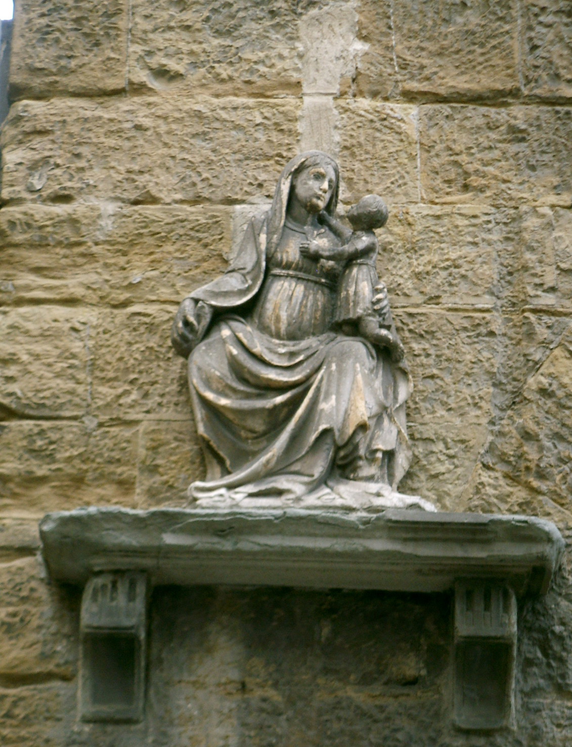 Palazzo antellesi via condotta, madonna della bottega di jacopo della quercia